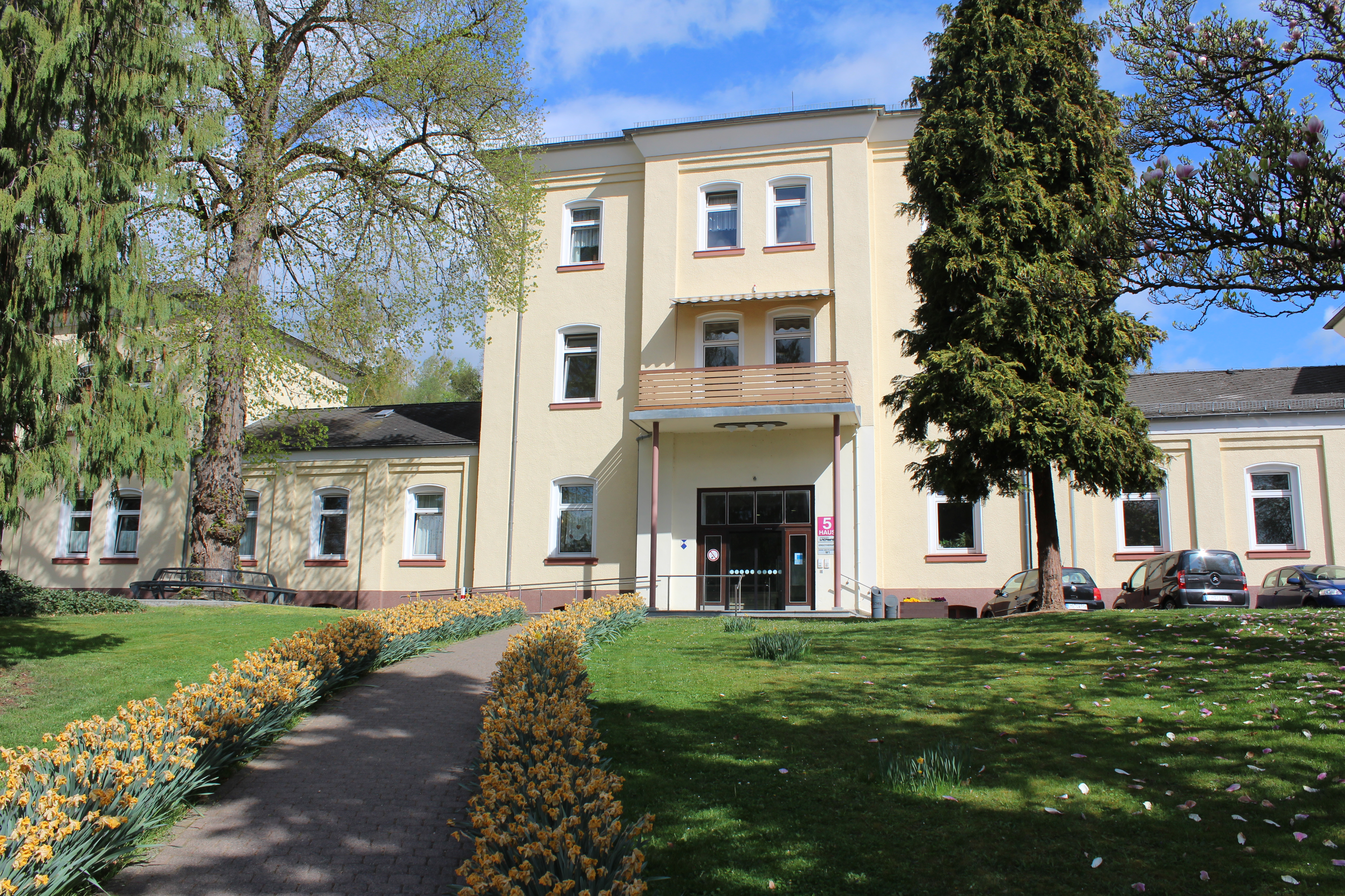 Deitsch: Außenansicht des Hauptgebäudes heute.